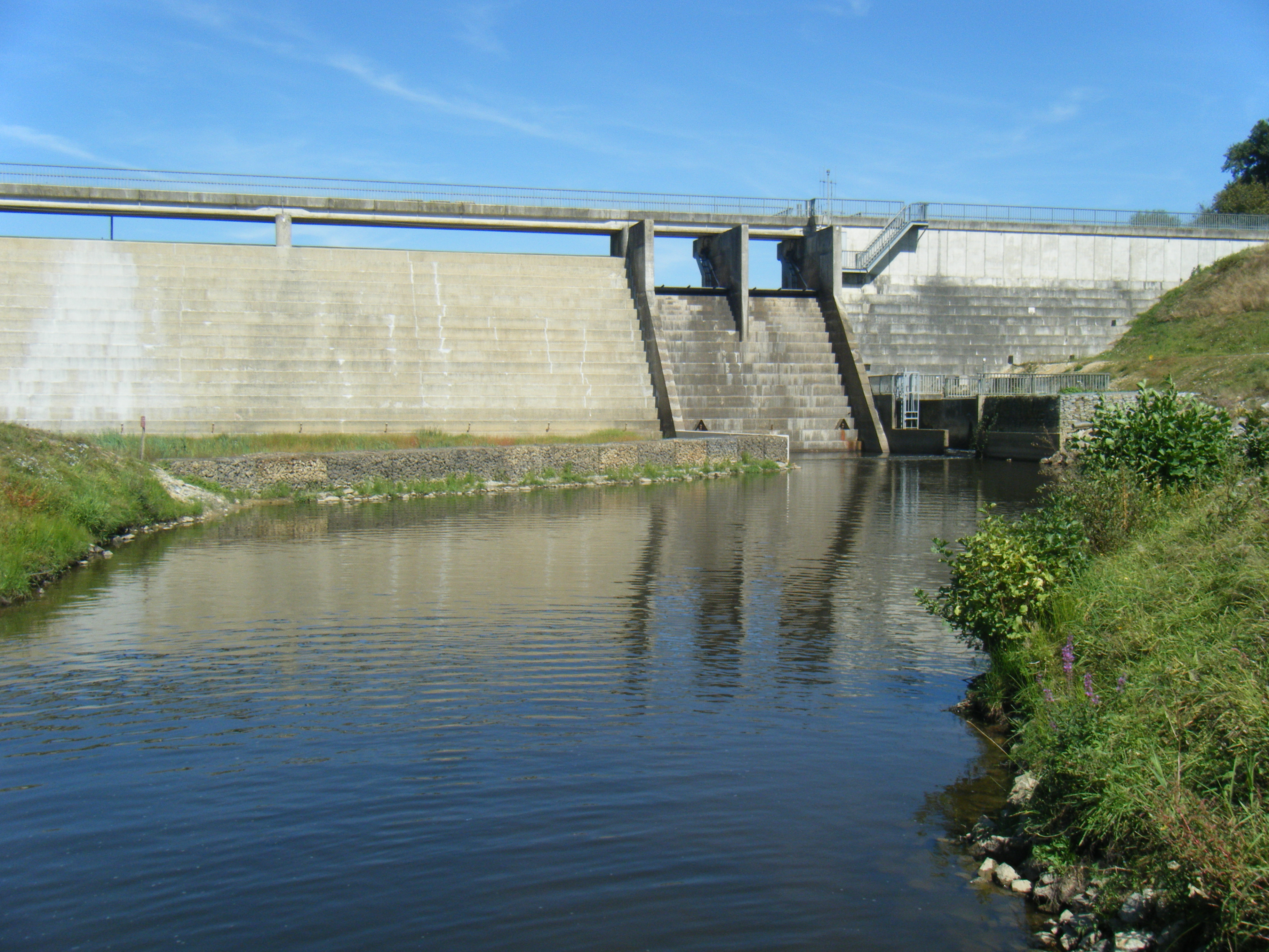 Barrage de la Cantache à Champeaux (Ille-et-Vilaine) et Pocé-les-Bois (Ille-et-Vilaine, Bretagne, France).